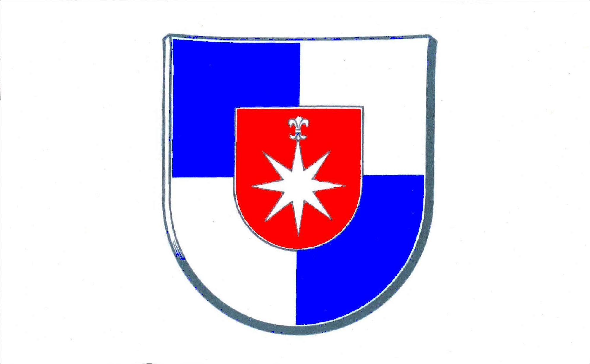 Die Flagge der Stadt Norderstedt in Schleswig-Holstein (siehe auch